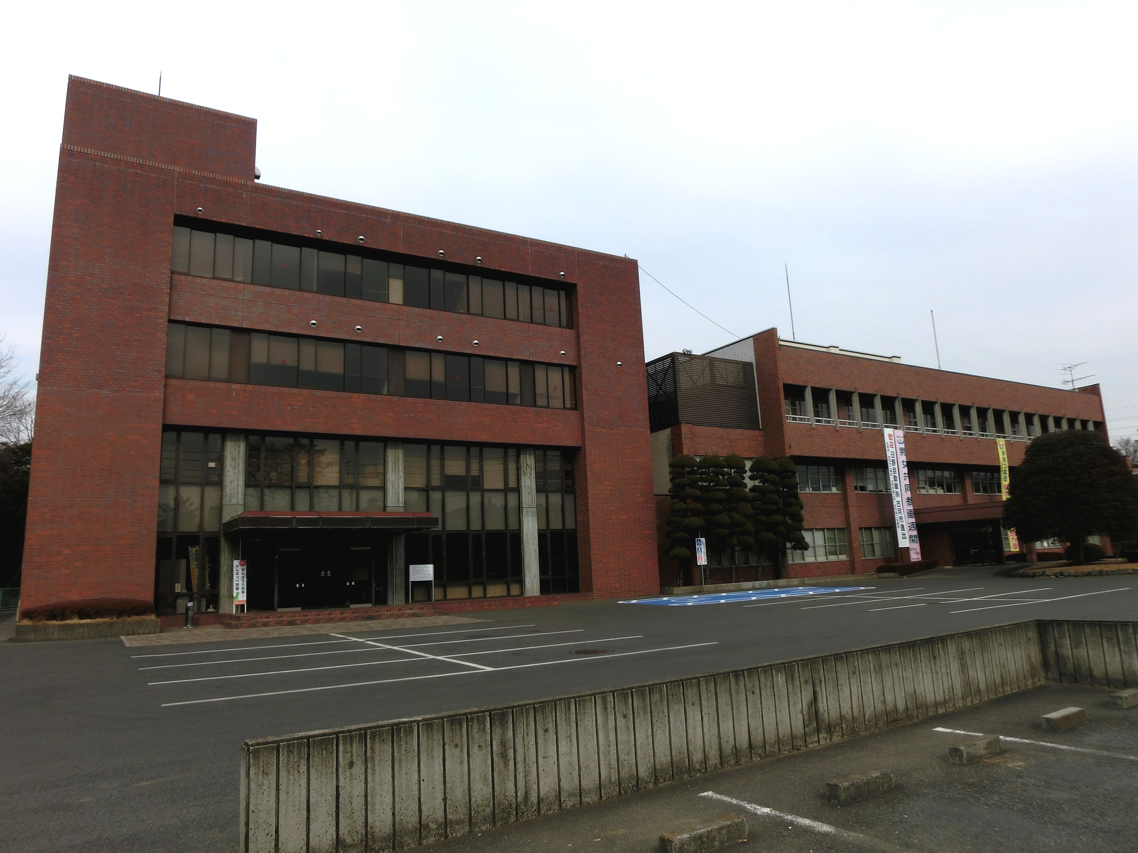 古河市役所本庁舎